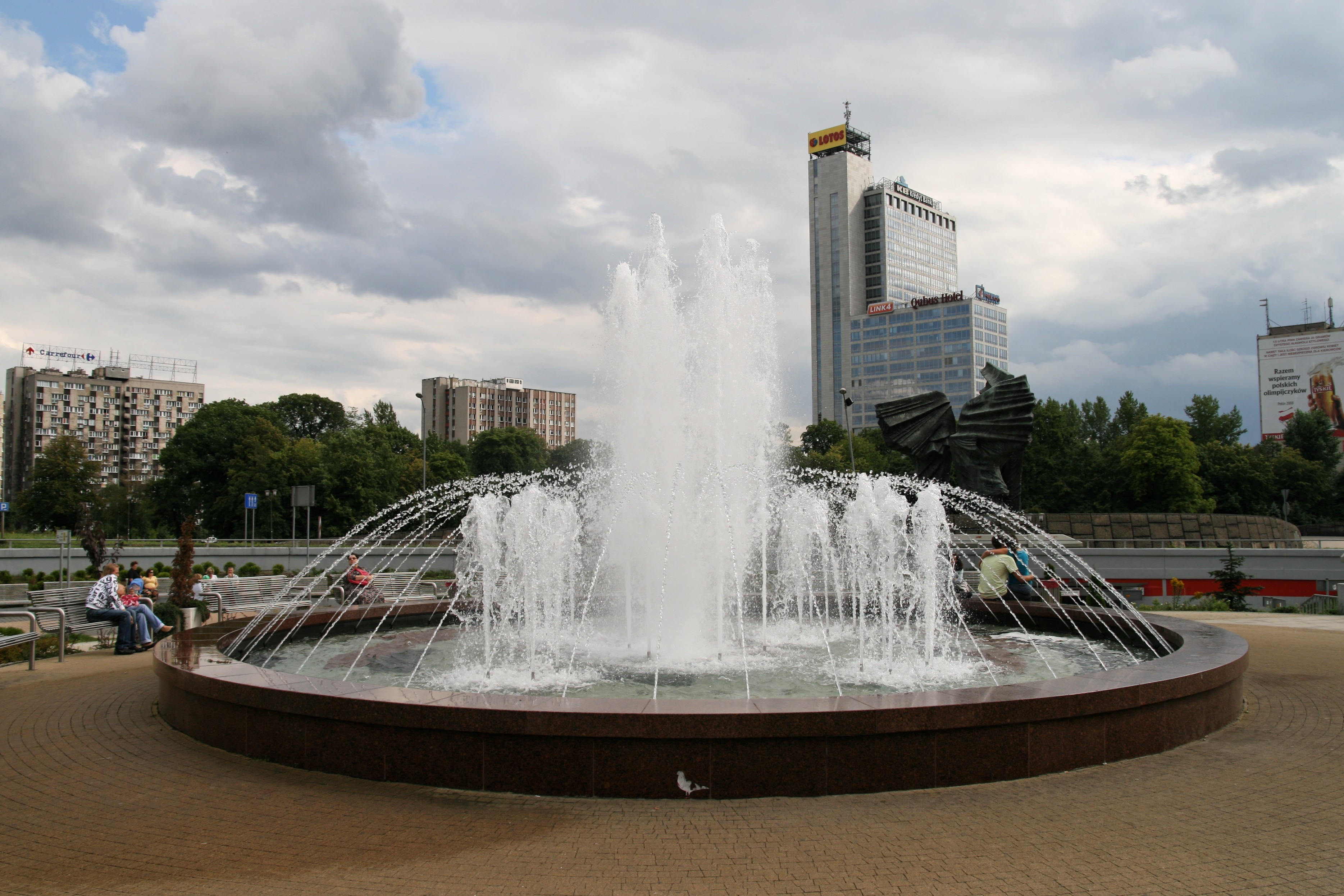 Fontanna na Rondzie w Katowicach.